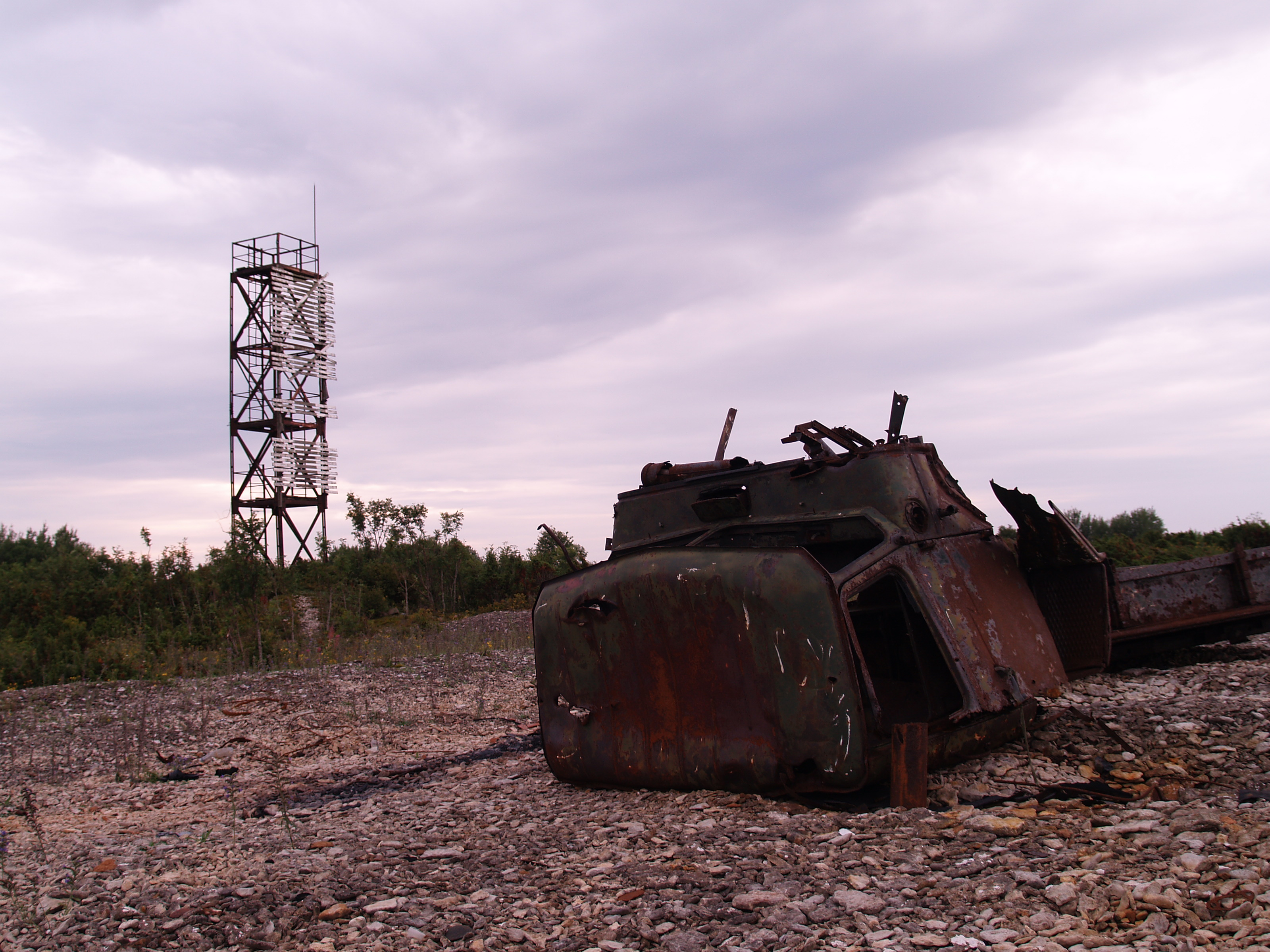 Metallsõrestiktorn Suur-Pakri kirdeosas.